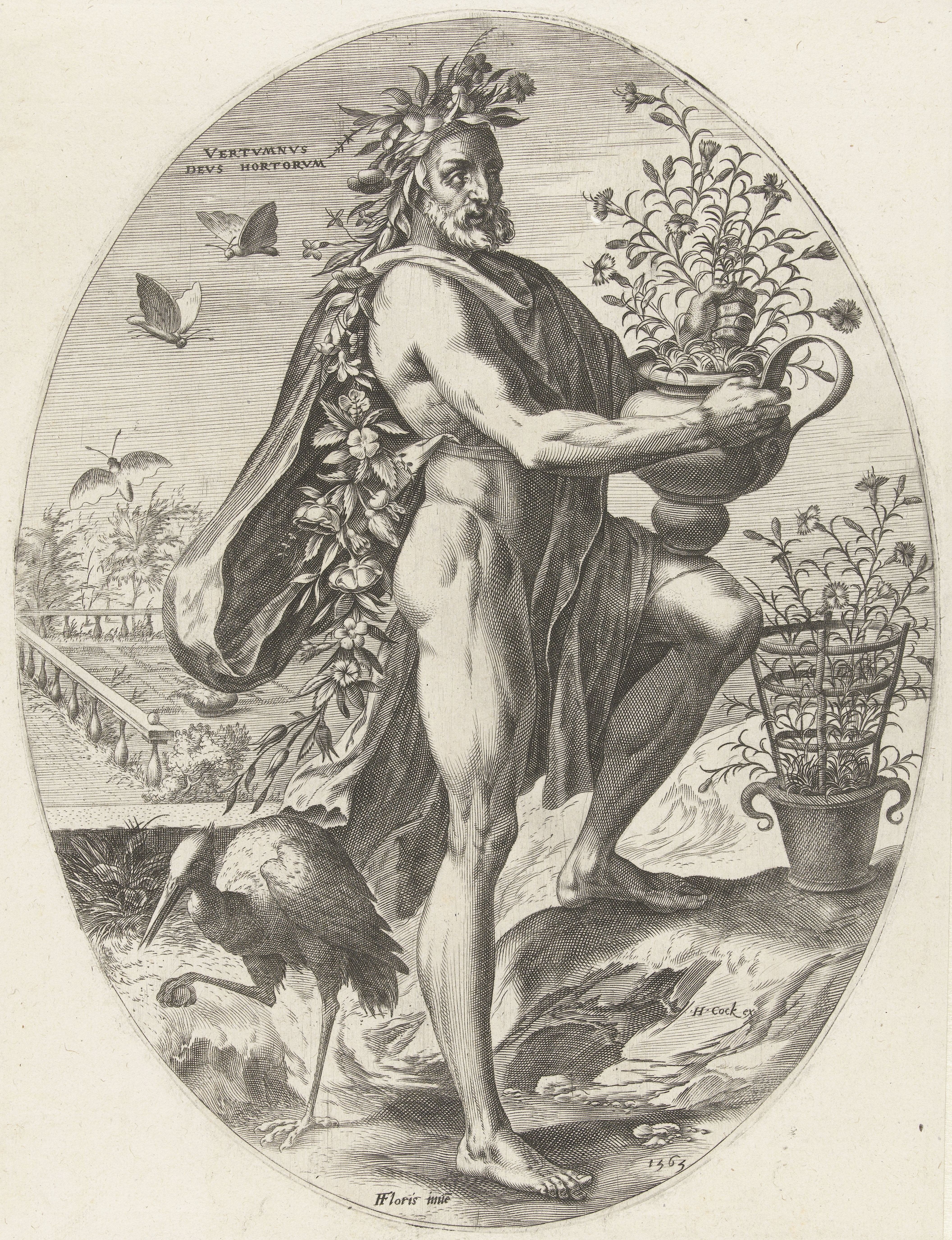 IdentificatieTitel(s): VertumnusGoden van de landbouw (serietitel)Objecttype: prent Serienummer: ?/6Objectnummer: RP-P-1986-376Catalogusreferentie: New Hollstein Dutch 171-1(2)Opschriften / Merken: verzamelaarsmerk, verso, gestempeld: Lugt 2228verzamelaarsmerk, verso, gestempeld: Lugt 1379verzamelaarsmerk, verso, gestempeld: Lugt 2542Omschrijving: Vertumnus, hier de god van de tuinen, is planten aan het verpotten. Naast hem staat een reiger op de grond. Op de achtergrond een tuin en vlinders.VervaardigingVervaardiger: prentmaker: Cornelis Cortnaar ontwerp van: Frans Floris (I) (vermeld op object)uitgever: Hieronymus Cock (vermeld op object)Plaats vervaardiging: AntwerpenDatering: 1565Fysieke kenmerken: gravureMateriaal: papier Techniek: graveren (drukprocedé)Afmetingen: plaatrand: h 290 mm × b 220 mmOnderwerpWat: (story of) VertumnusVerwerving en rechtenCredit line: Schenking van jkvr. A.C. Teding van Berkhout, Amsterdam en S.F. barones van Höevell-Teding van Berkhout, Bergen (Noord-Holland)Verwerving: schenking 1986Copyright: Publiek domein